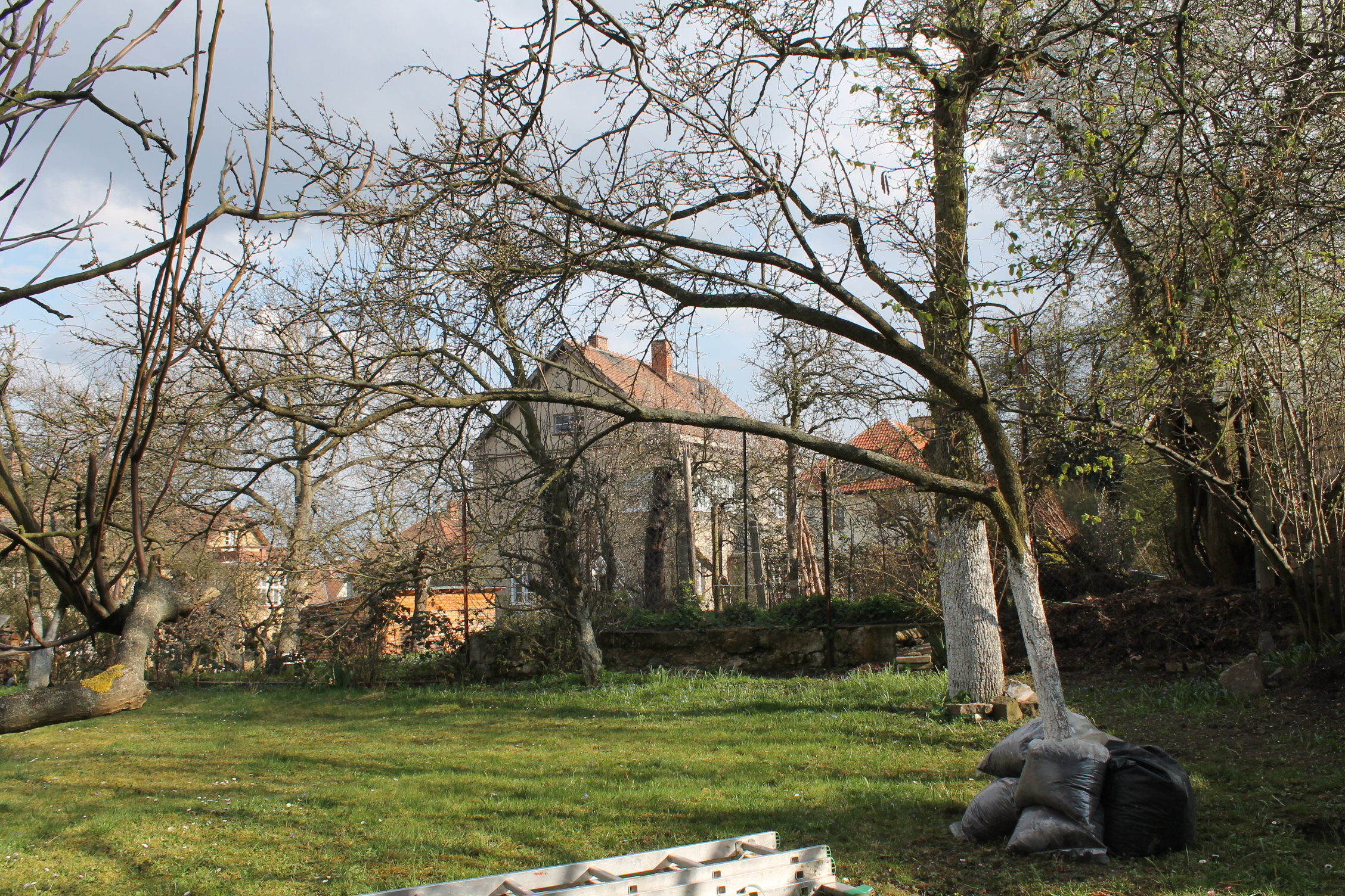 slivoň rostoucí pod ořechem